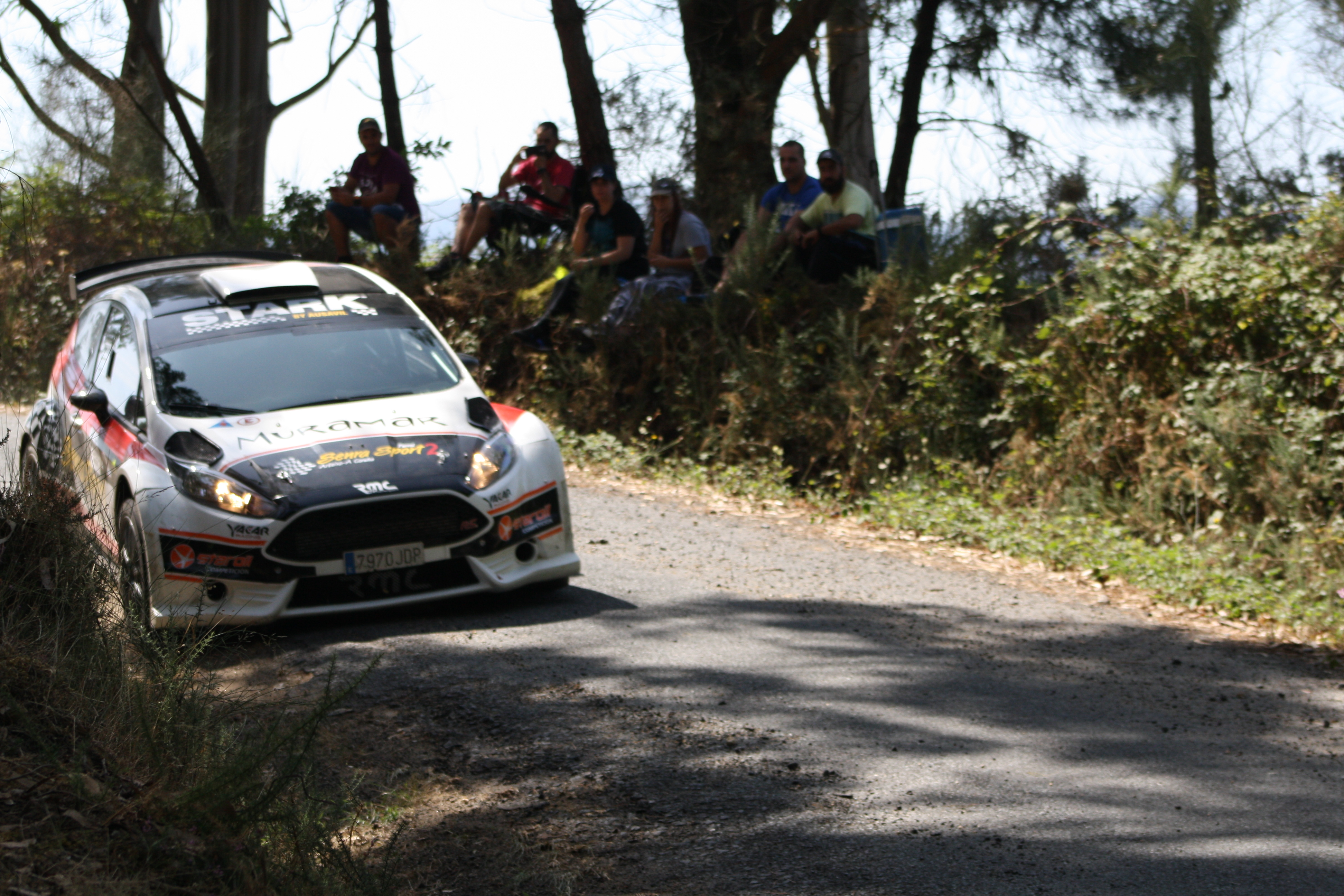 Rally Botafumeiro 2018. Tramo de Sarandón.